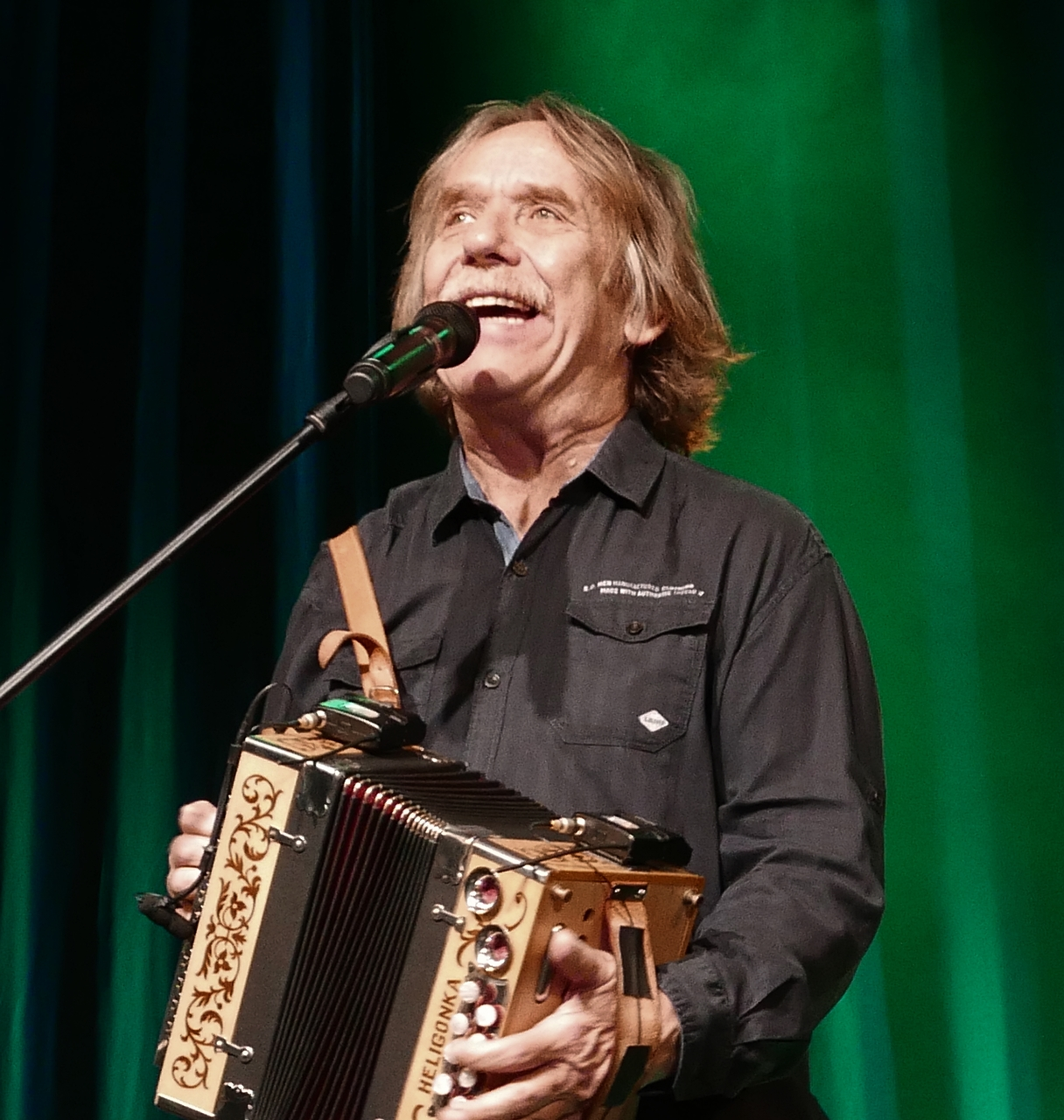 Jaromír Nohavica concert Bielsko-Biala